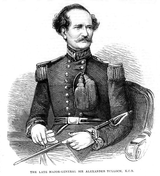 Alexander Tulloch